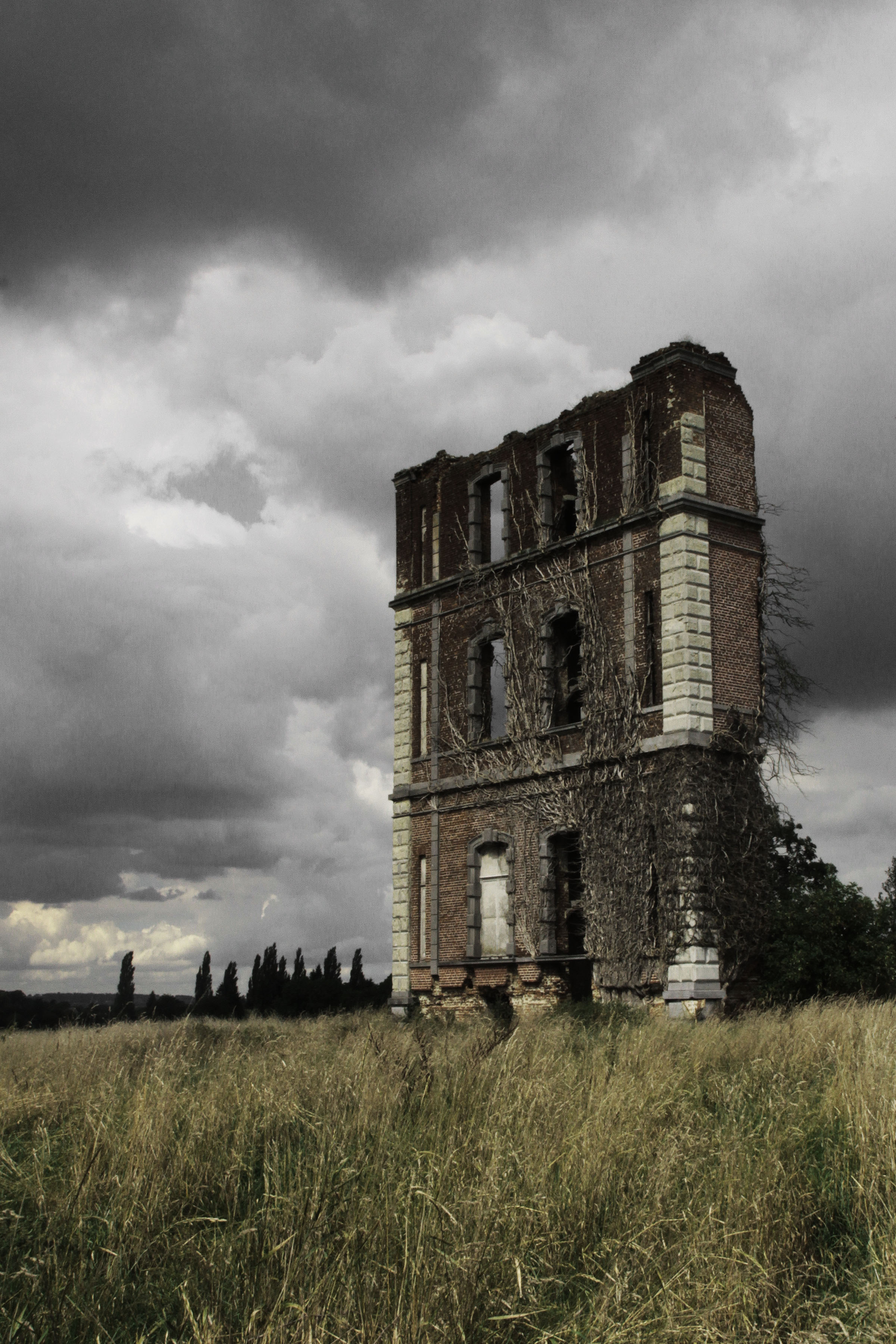 Ruines du château de la Glacière - Ormeignies